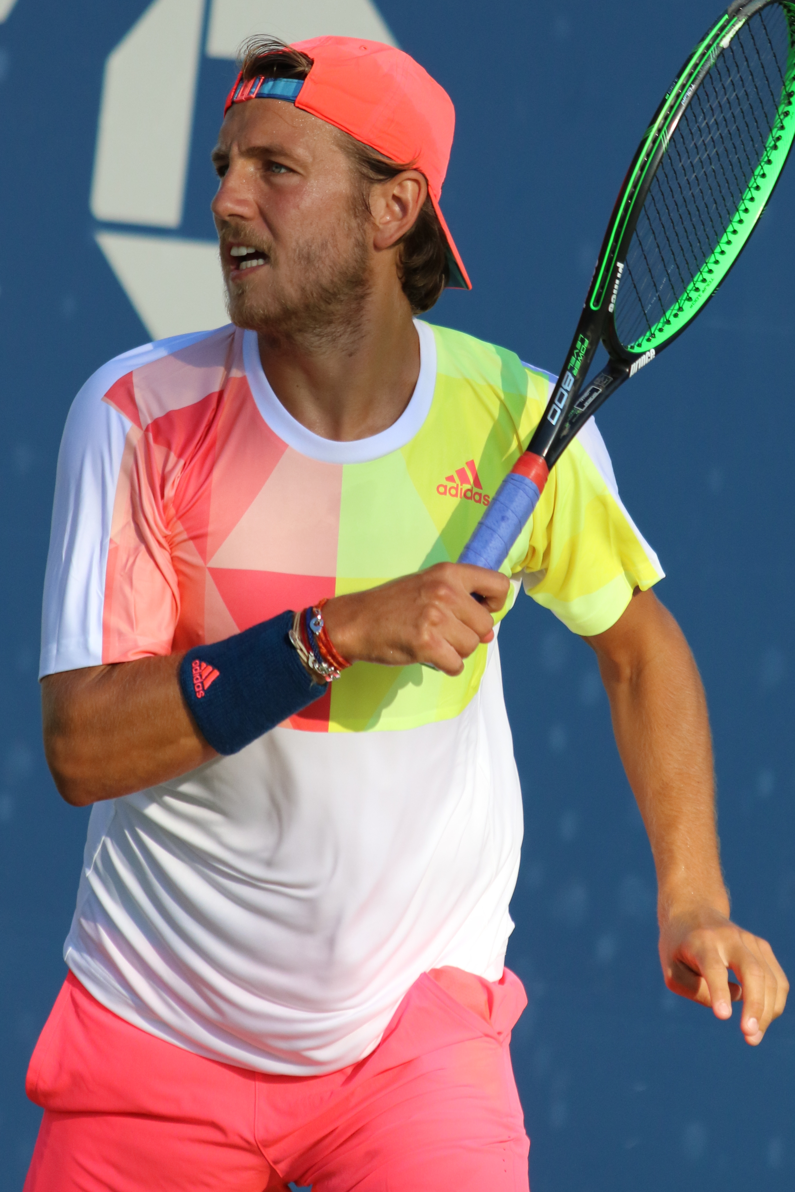 Pouille US16 (35)